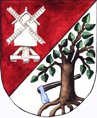 Das von dem Lokalhistoriker Paul Theile geschaffene Wappen für den Stadtteil Bemerode von Hannover ...